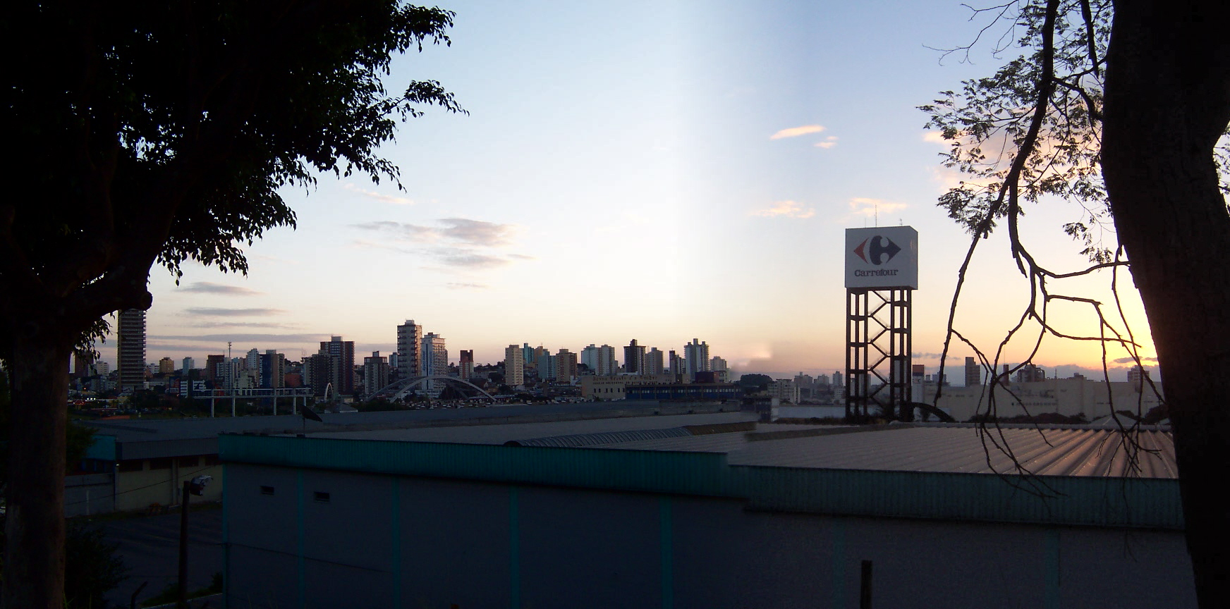 Osasco - SP